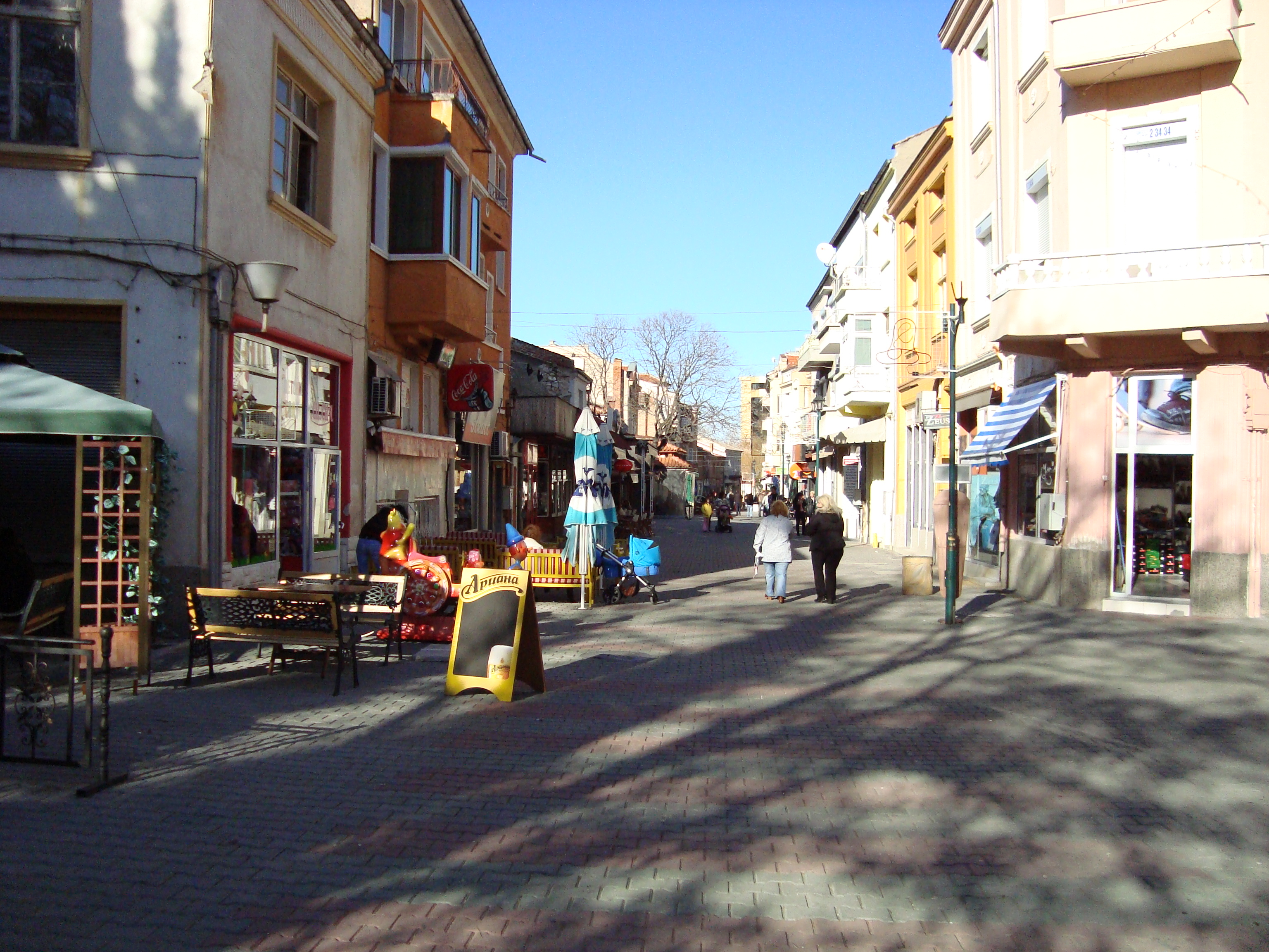 Централна улица на Асеновград